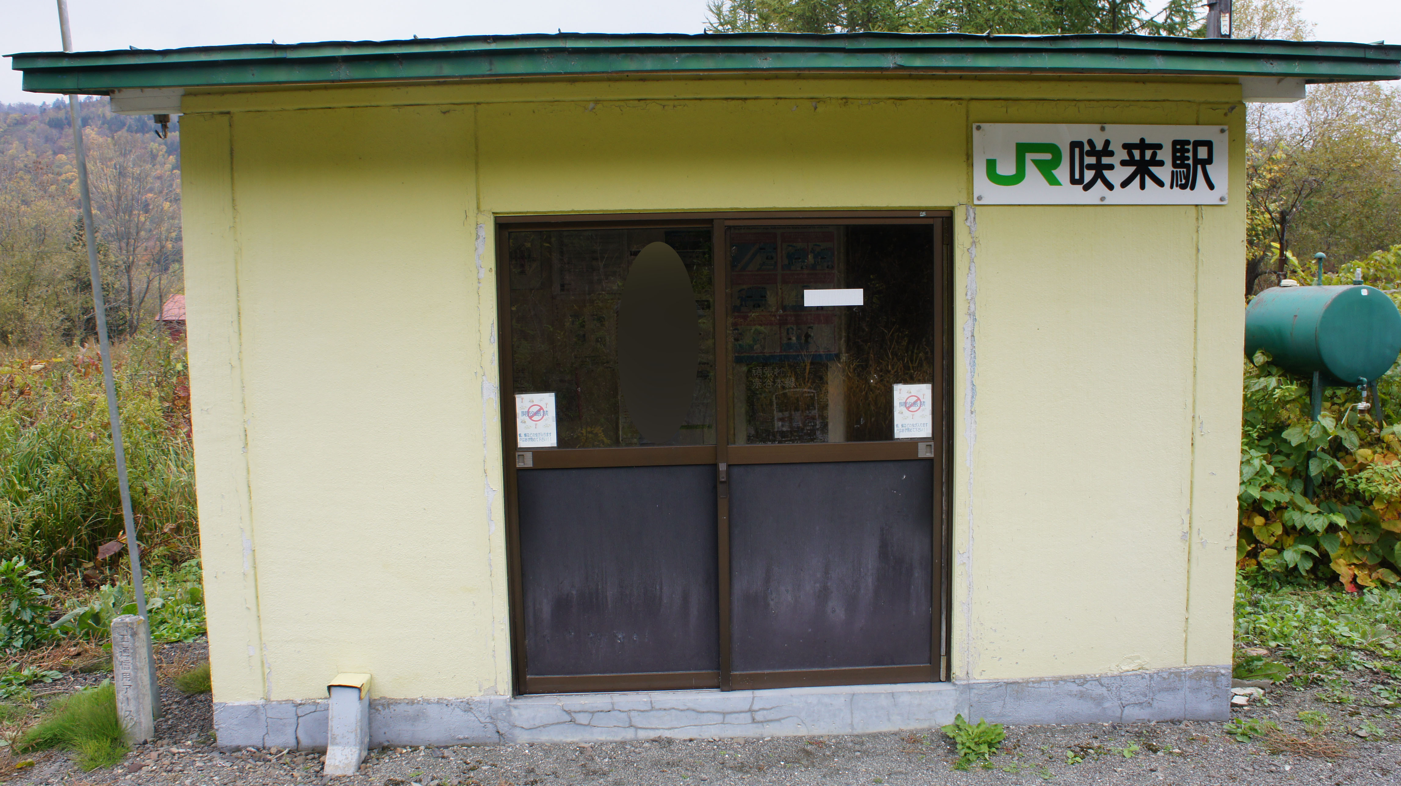 JR宗谷本線・咲来駅の駅舎 Sony NEX-3